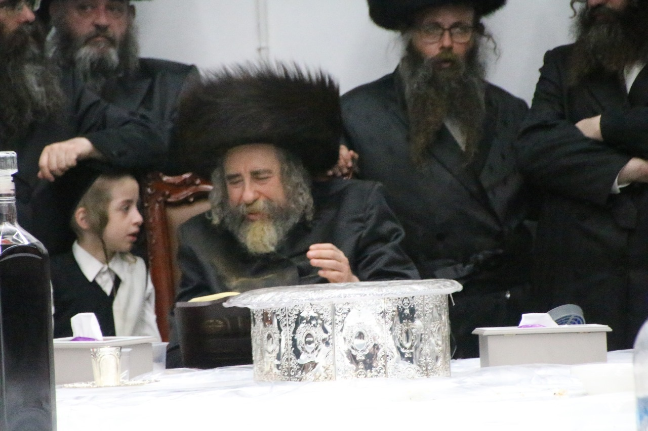 רבי דוד טברסקי האדמו"ר מרחמסטריווקא בטיש של מוצאי שביעי של פסח